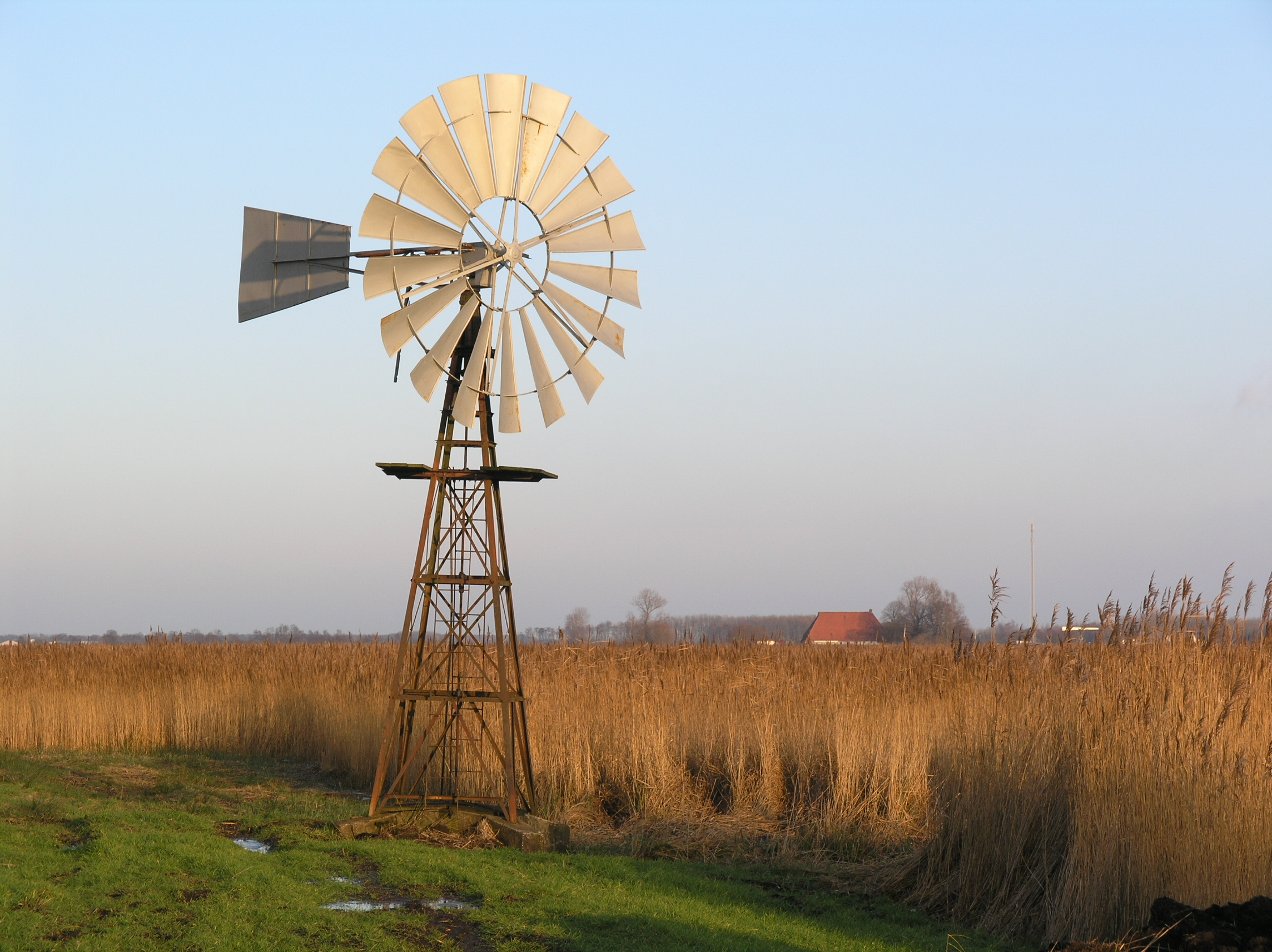 Nijetrijne Windmotor Lindedijk